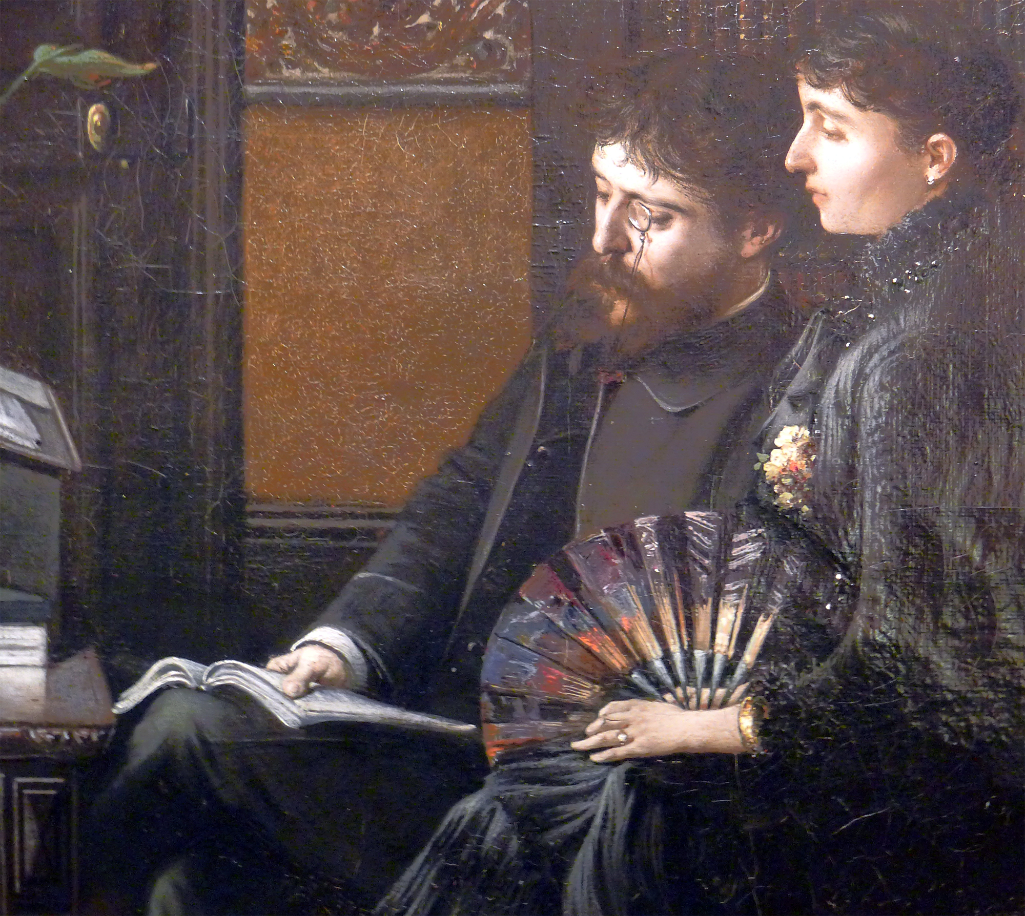 Tableau « Alphonse Daudet dans son cabinet de travail avec son épouse » (détail)